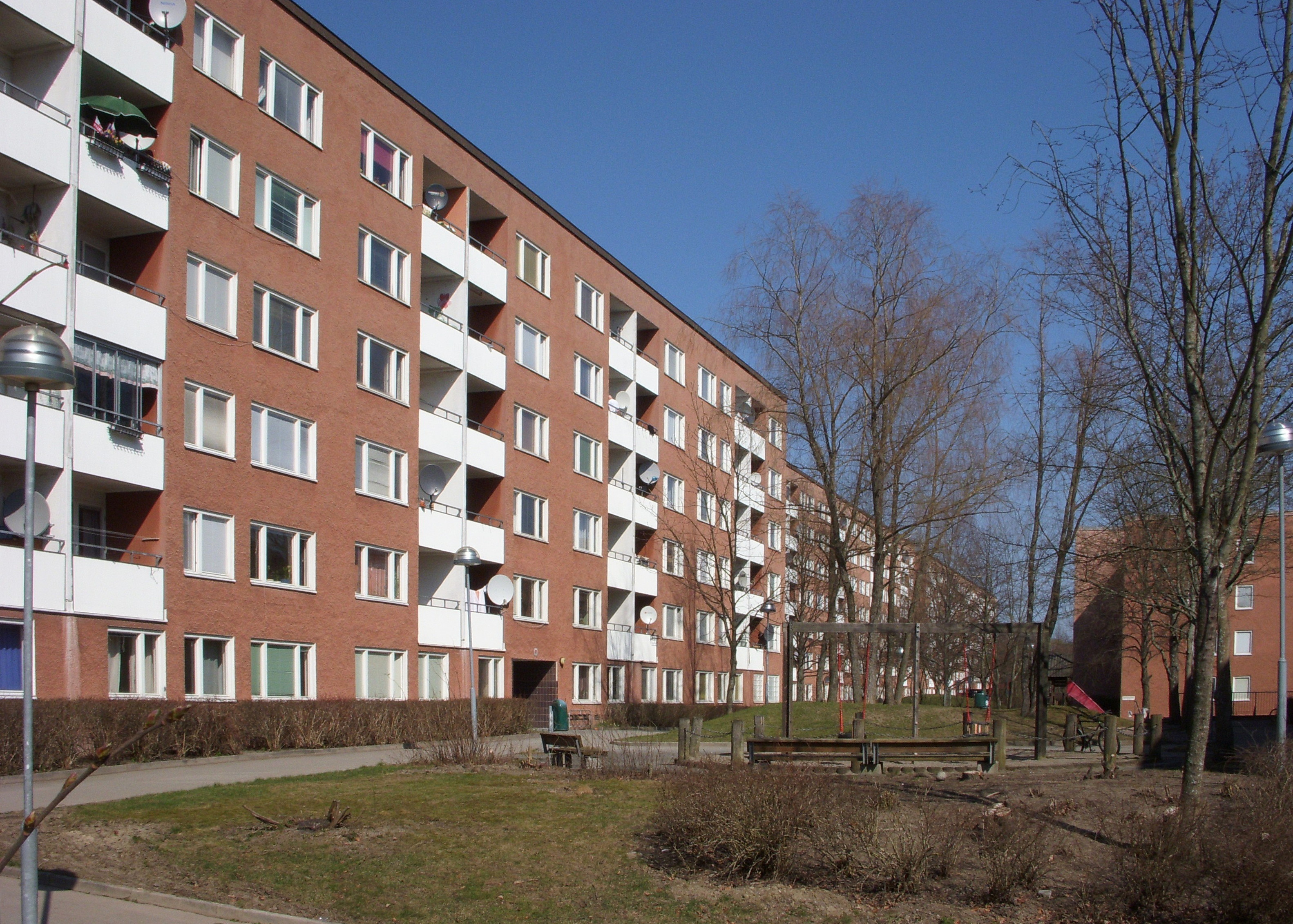 Bostadshus vid Krongårdsvägen, Vårby gård